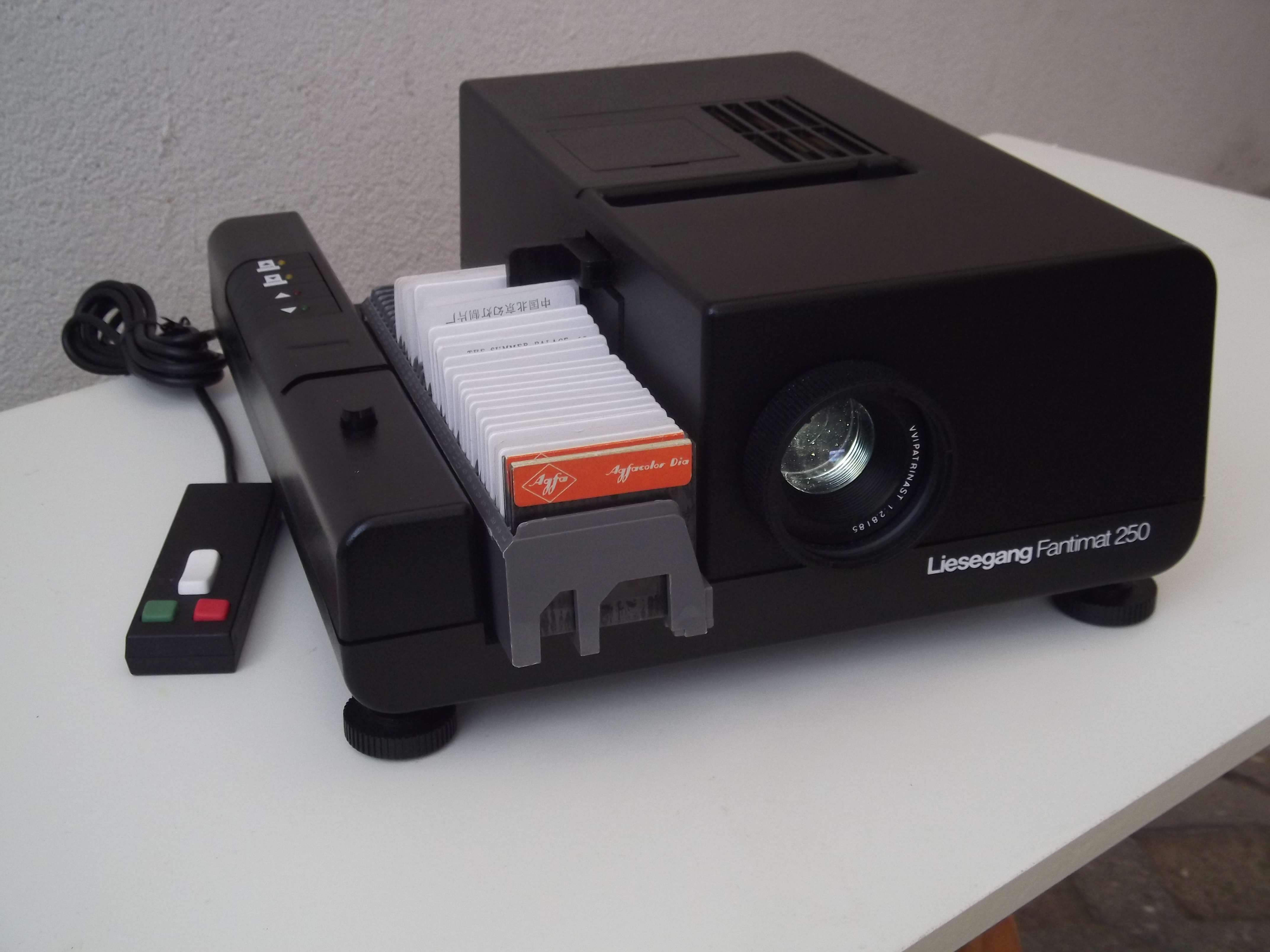 Liesegang Fantimat 344, Lampe 24V, 250W in verschiedenen Ausführungen, mit Objektiven f=35mm bis 250mm, in Düsseldorf bis 1989 gefertigt.